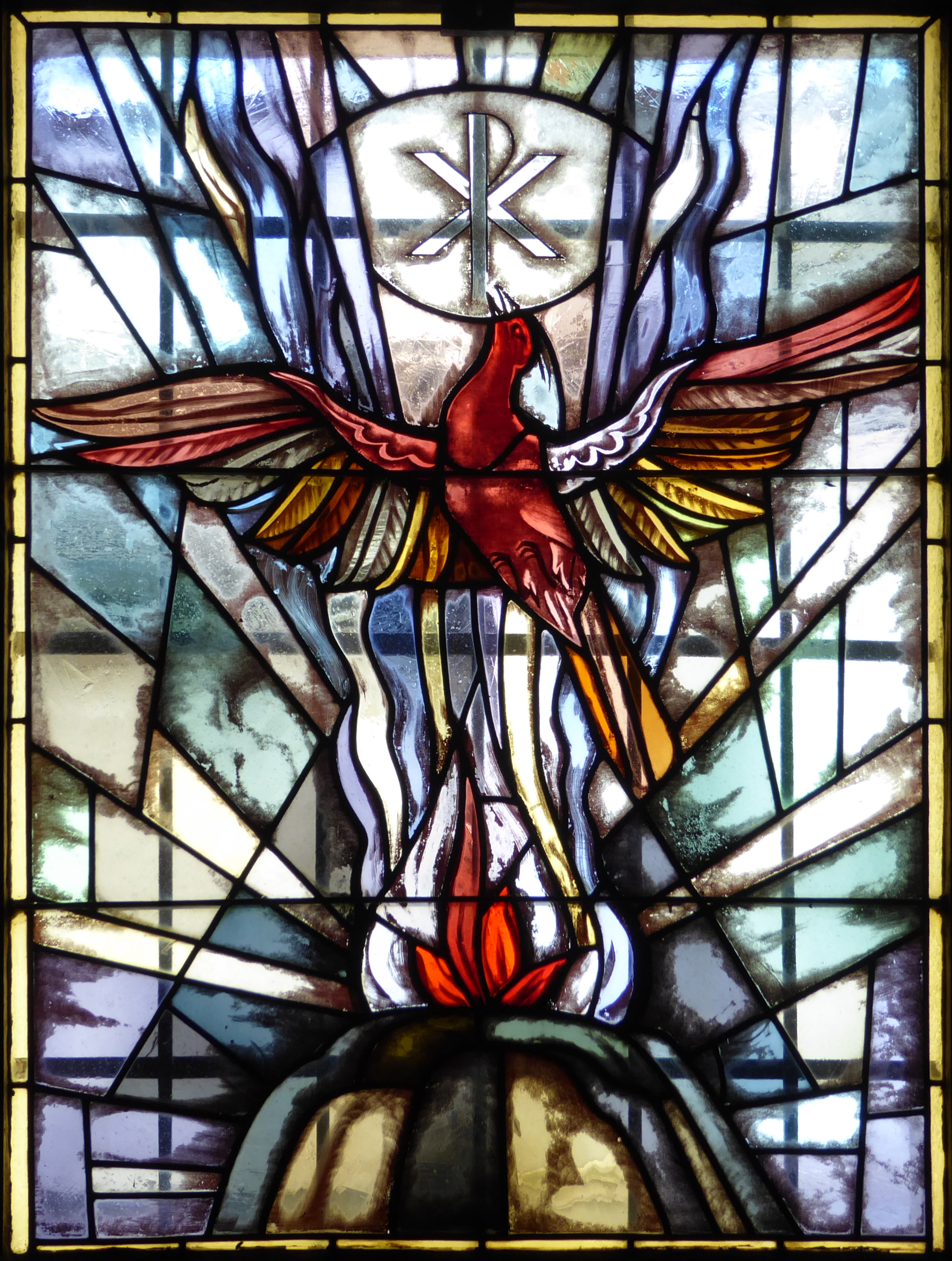 Pfarrkirche hl. Petrus, Kirchenplatz 2, Purgstall an der Erlauf, Niederösterreich - Glasfenster (Phönix) in der nördlichen Seitenkapelle (im Turmwinkel)